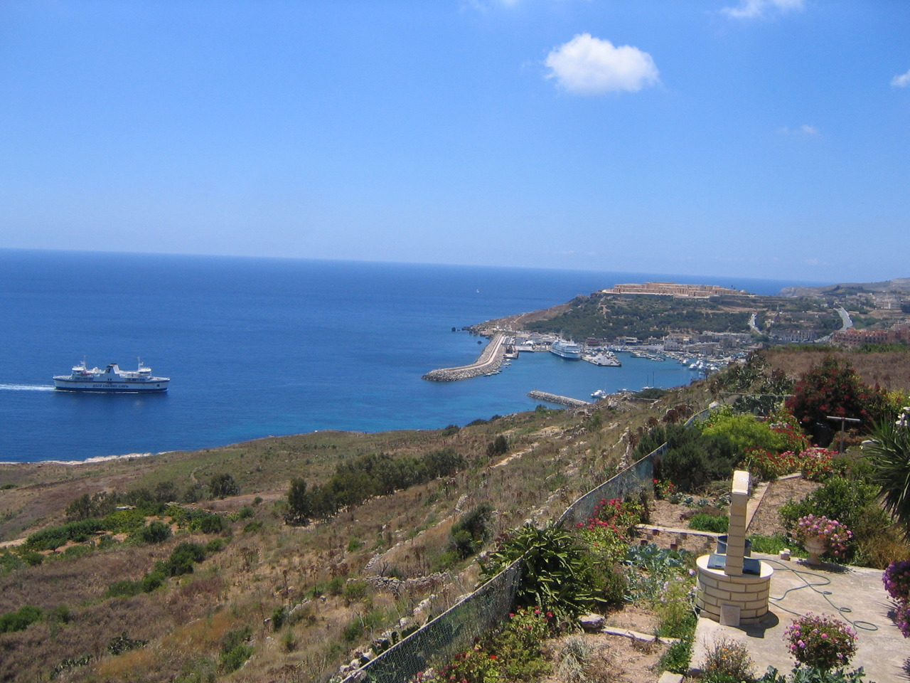 Mgarr